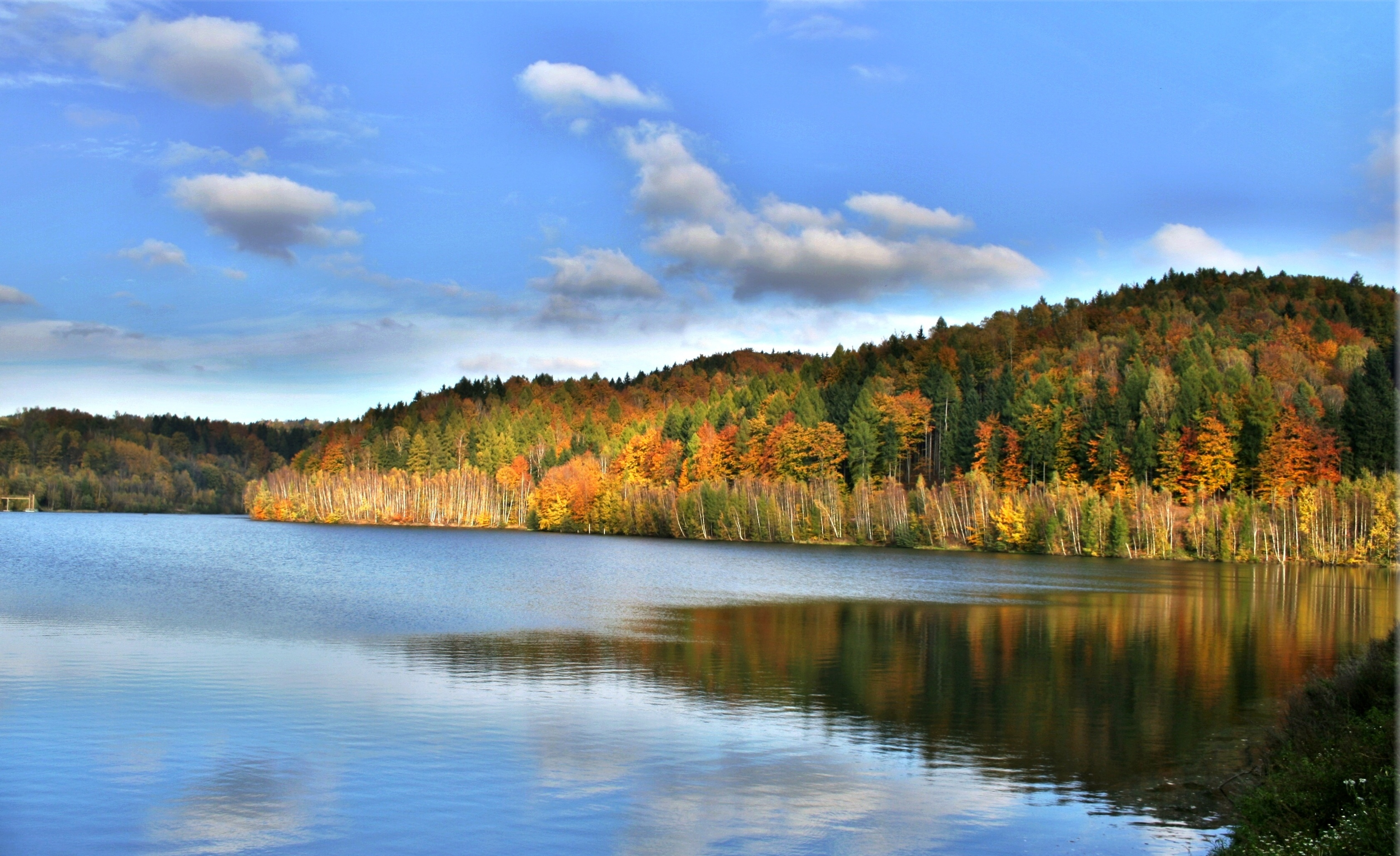 Debrné (Trutnov) , zaniklá obec